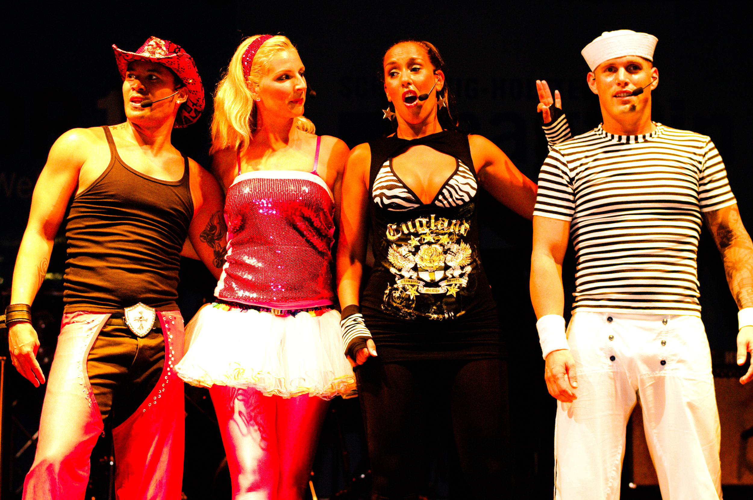 Die Popgruppe "The Vengaboys" im Jahr 2009.